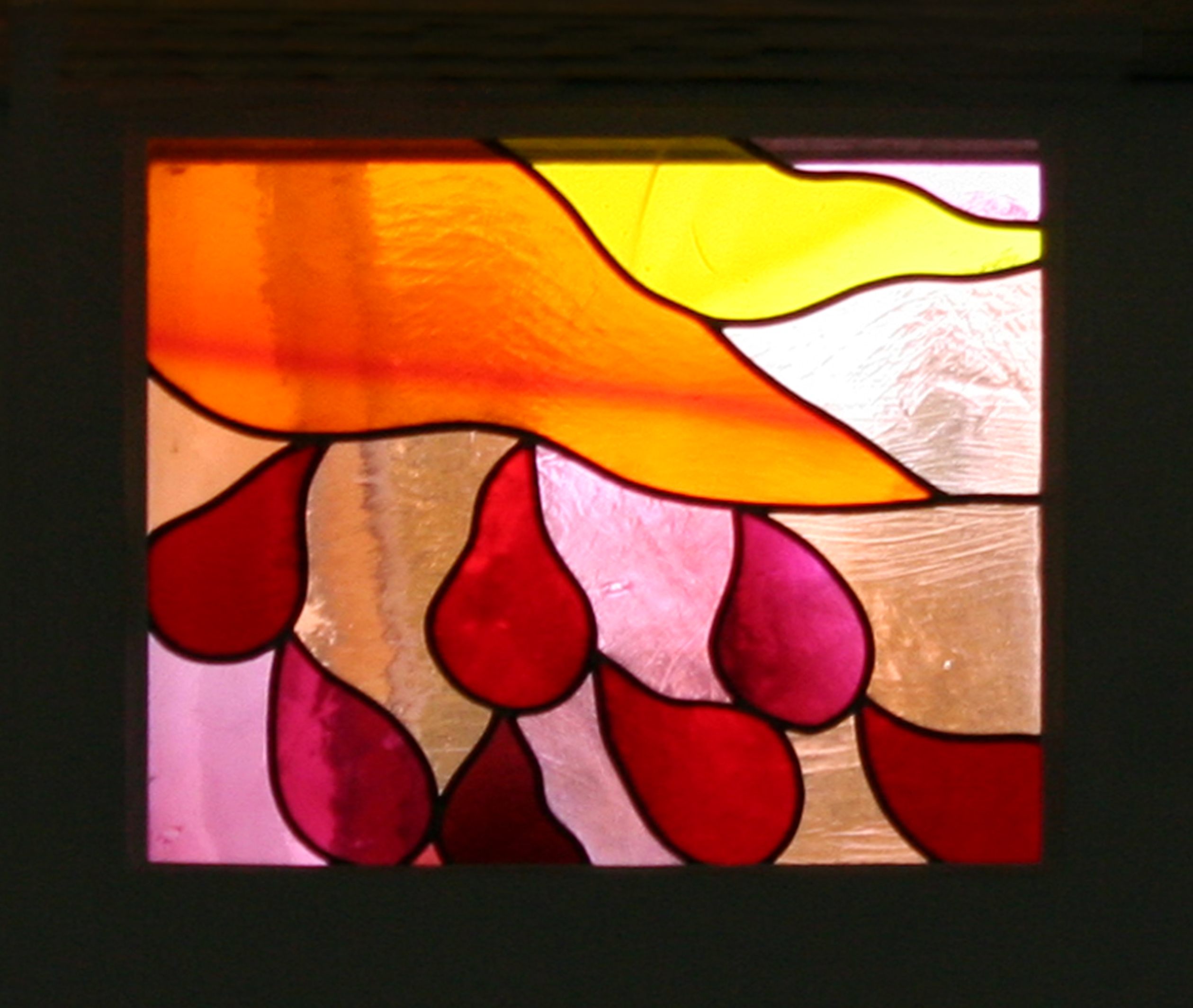 Kloster Ilanz, Klosterkirche, Glasfenster von Max Rüedi